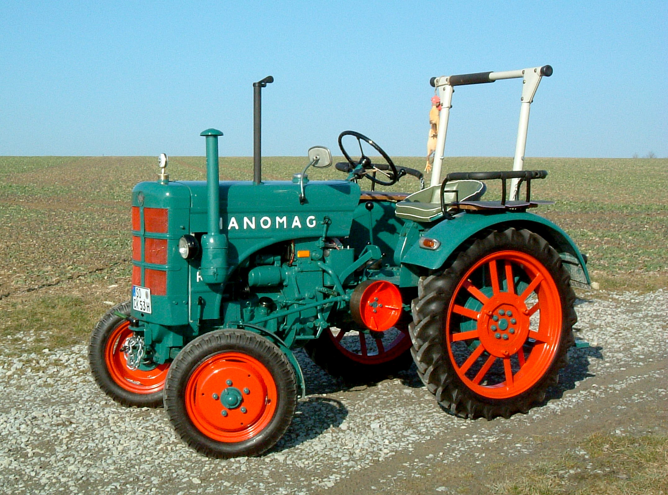 Hanomag-Schlepper R 16 B (Normalradausführung), Baujahr 1953